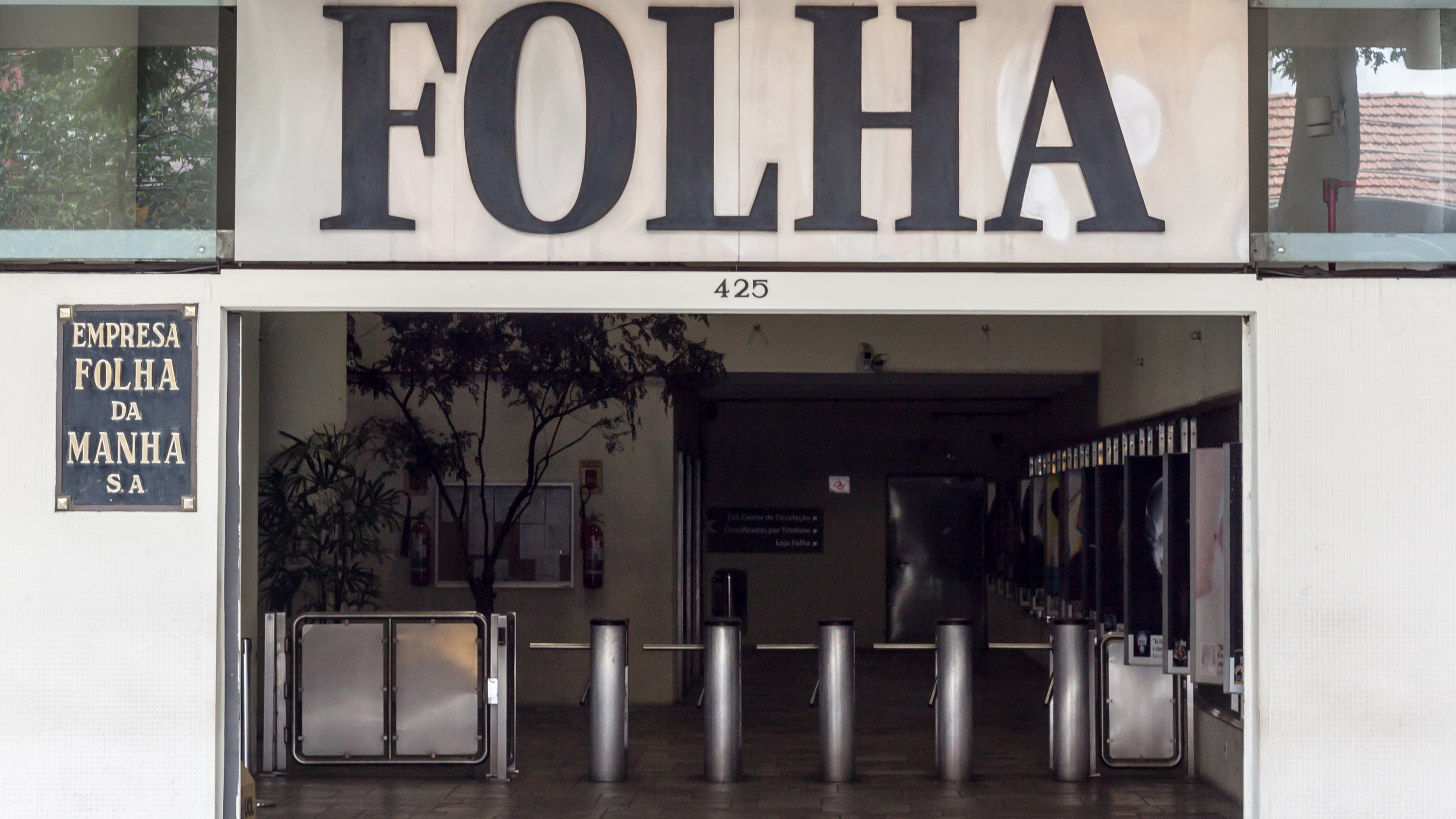 Sede Grupo Folha